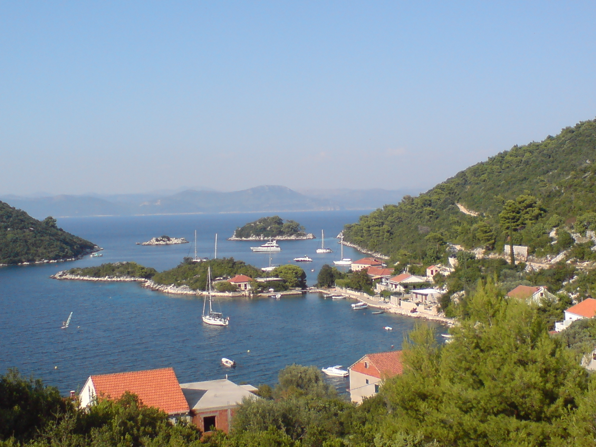 Prožurska luka bay, Mljet, Croatia